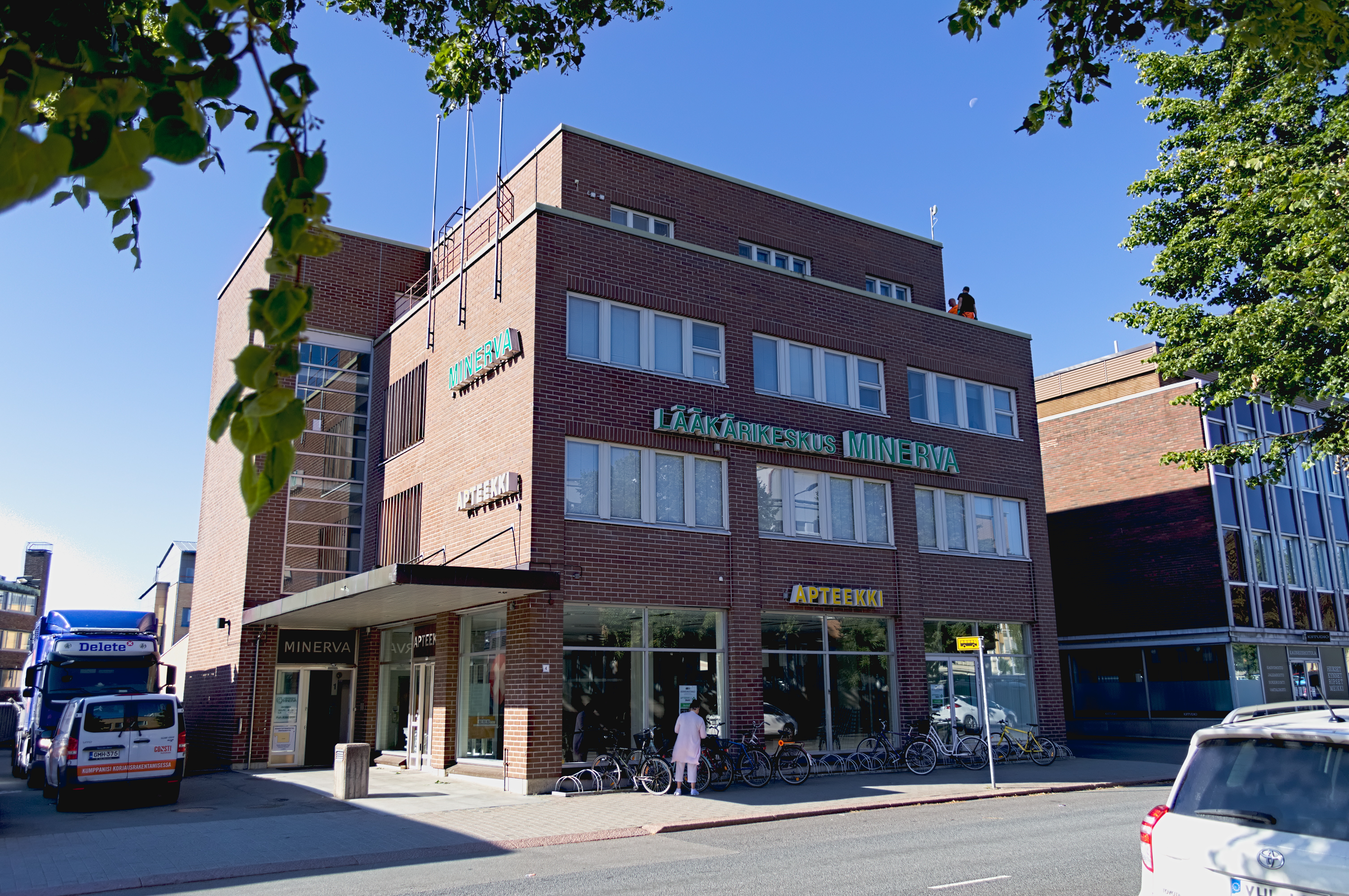 Lääkärikeskus Minervan toimistorakennus Raumalla